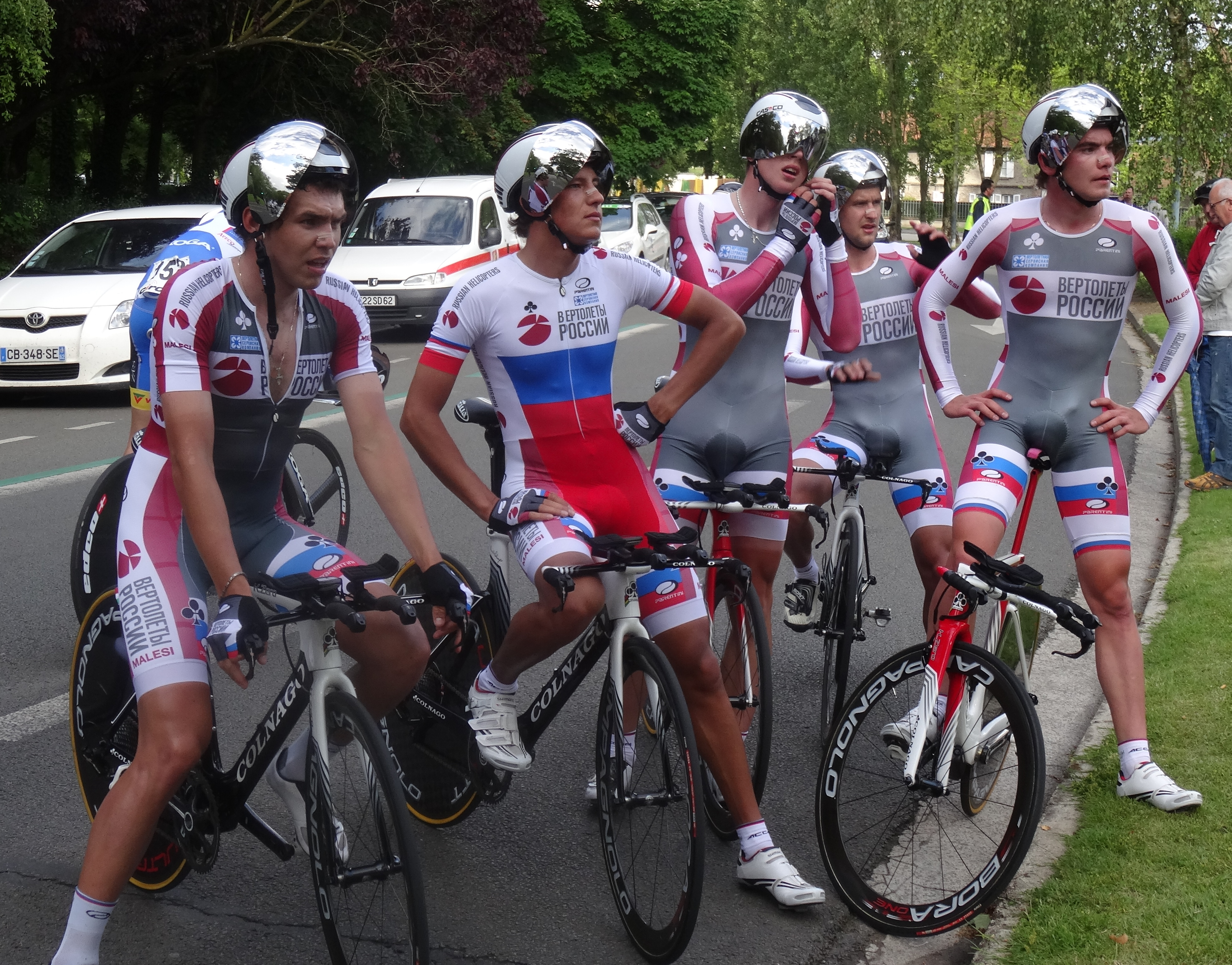 Reportage photographique réalisé le vendredi 23 mai 2014 à l'occasion de l'arrivée de la première étape du Paris-Arras Tour 2014 devant la citadelle d'Arras, Pas-de-Calais, Nord-Pas-de-Calais, France. Depicted team: Russian Helicopters